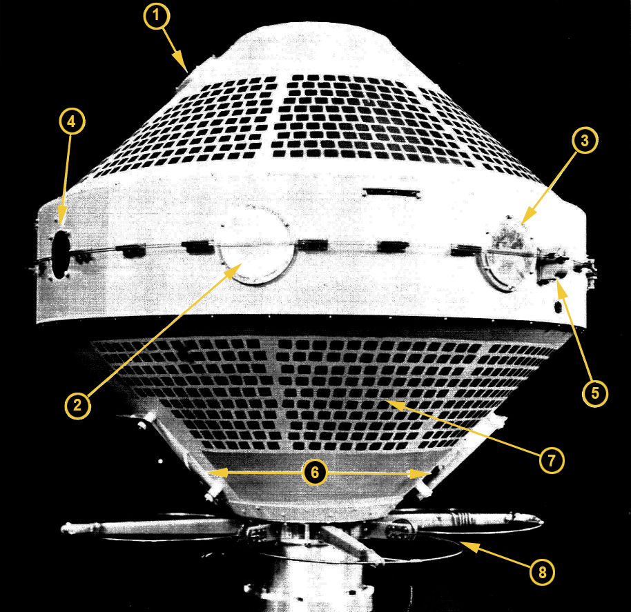 Satellite de la NASA Explorer 8 : position des composants